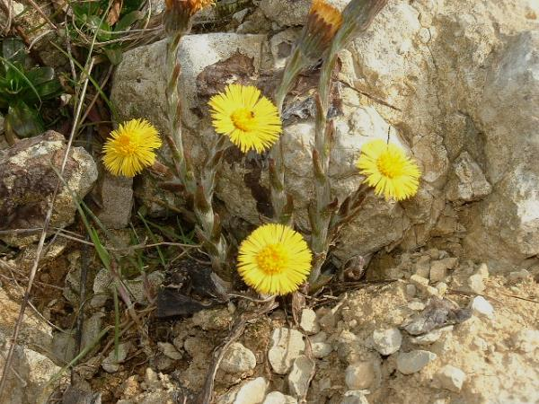 Tussilage (Tussilago farfara) image perso Velleclaire licence GFDL